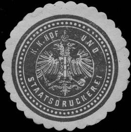 Sealing stamp Title: K.K. Hof- und Staatsdruckerei Description: schwarz, weiß Place: Wien size: 4 cm